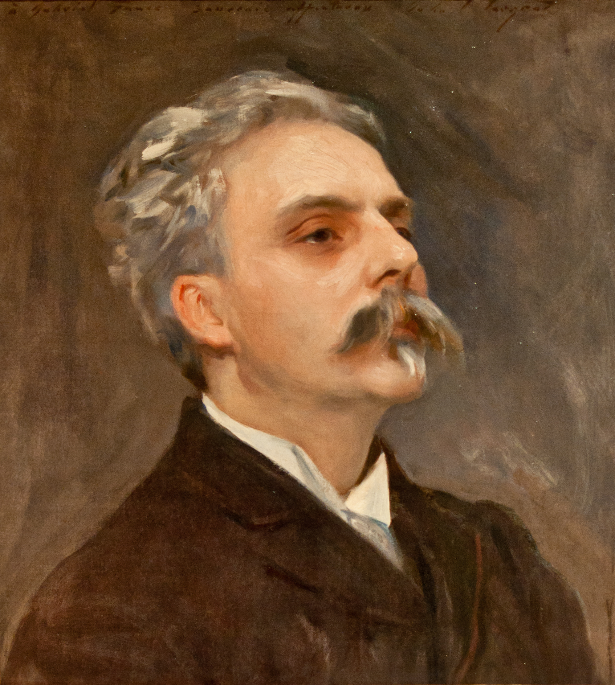 Portrait de Gabriel Fauré peint par John Singer Sargent vers 1889. Exposée au musée de la musique à Paris (cité de la musique). cette huile sur toile a été acquise en 1984.